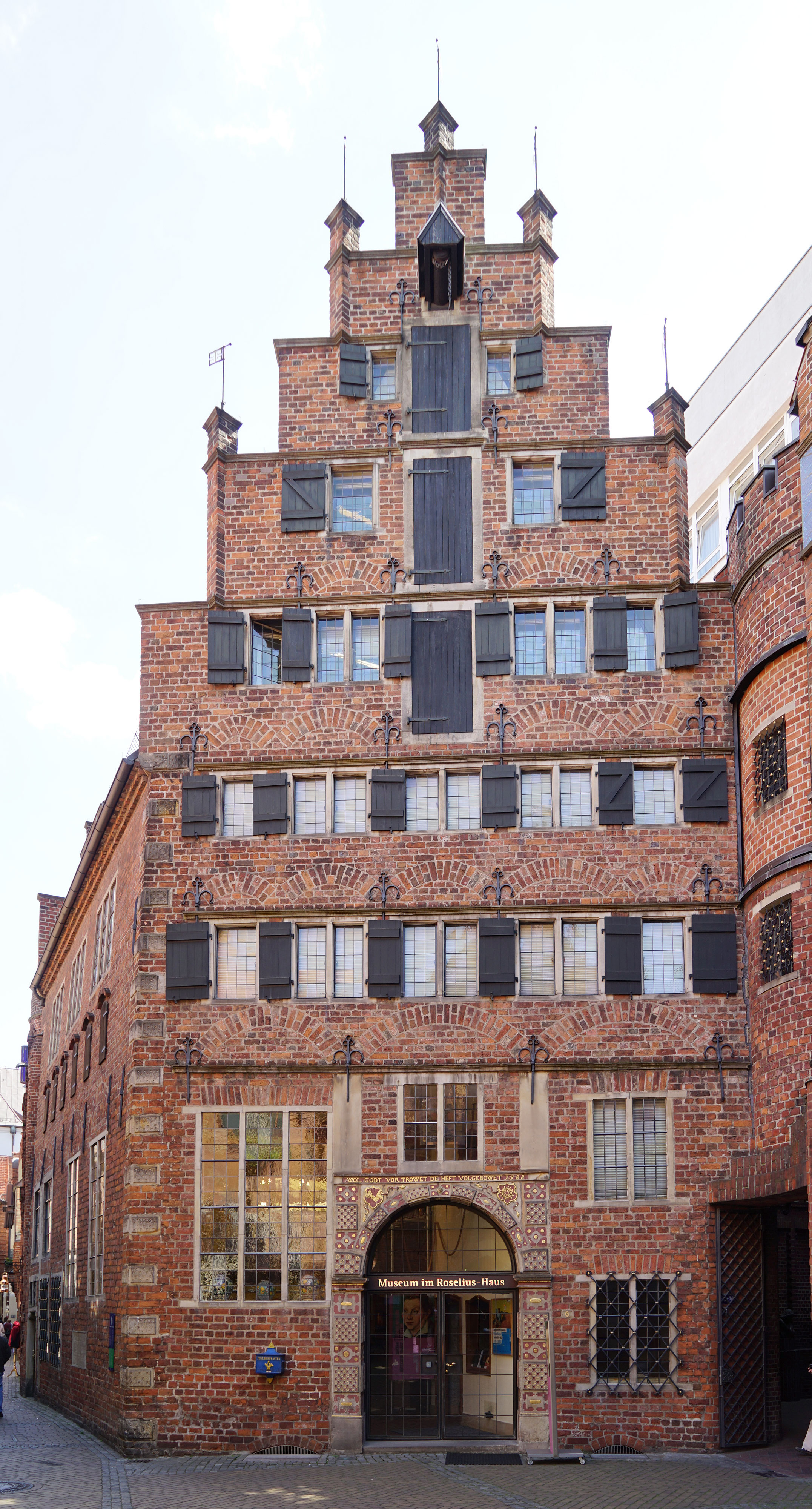 Roseliushaus in Bremen, Böttcherstraße 6Das abgebildete Objekt ist ein geschütztes Kulturdenkmal in der Freien Hansestadt Bremen, mit der Nr. 1501 beim Landesamt für Denkmalpflege registriert.